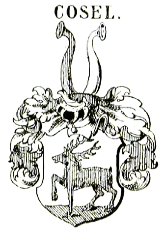 Wappen derer von Cosel; Reichsadelsstand 1667, in Kurbrandenburg anerkannt 1668.